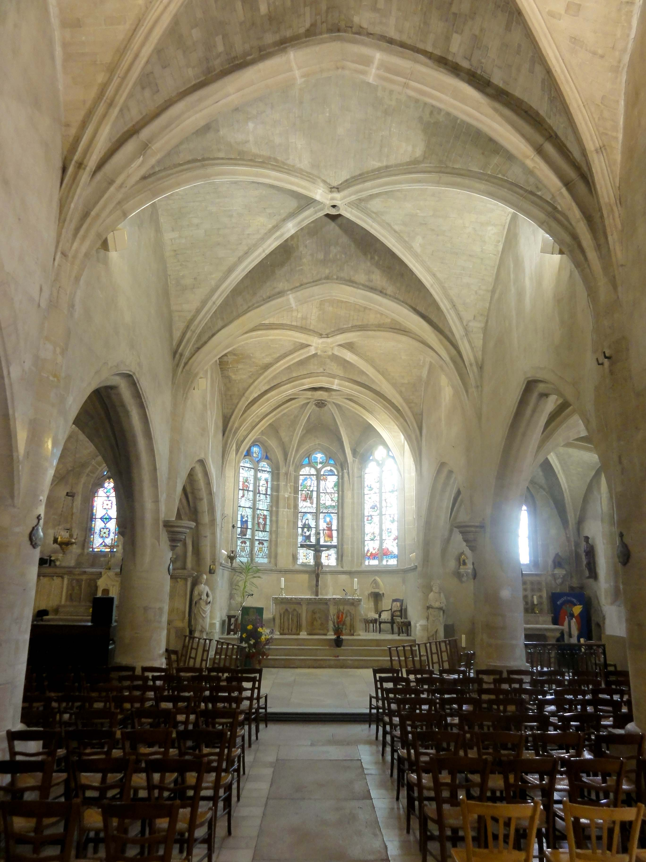 Intérieur de l'église - voir titre.